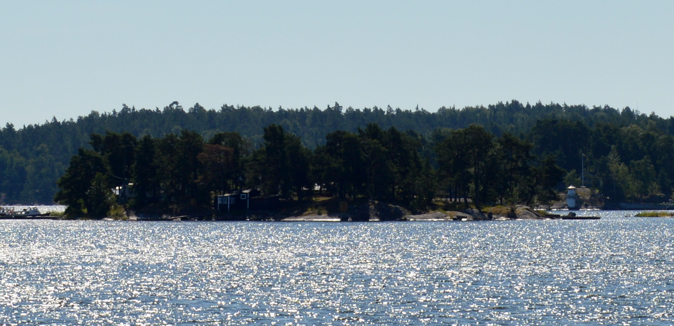 Norra Idskär